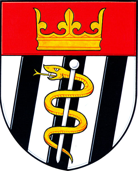 Česky: znak obce Paseka